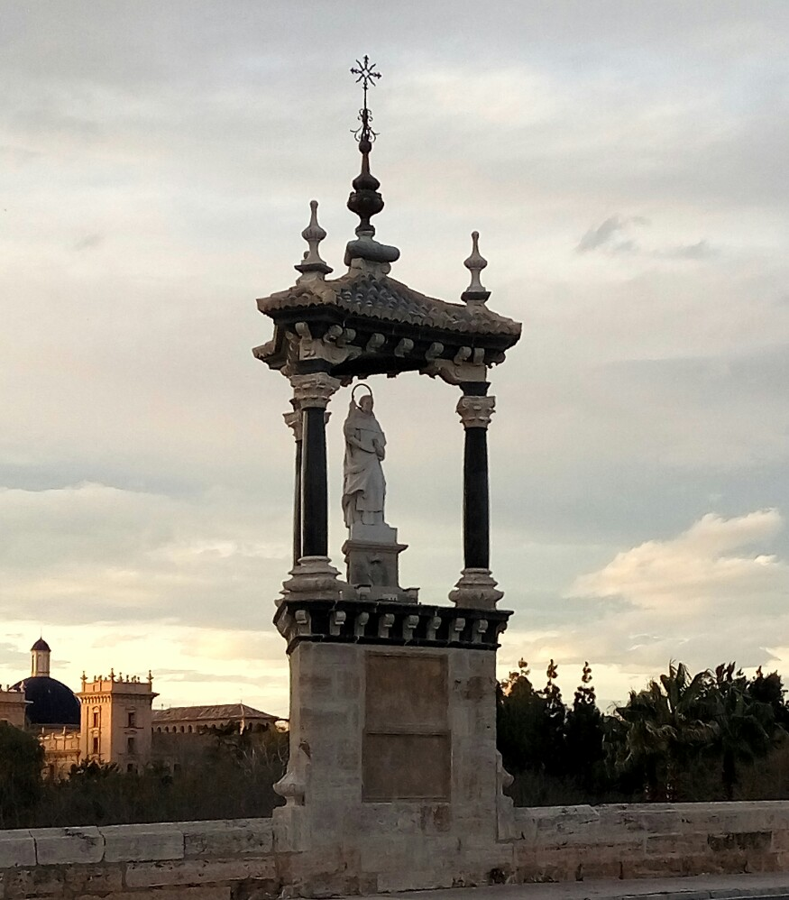 Casalicio de San Vicente Ferrer en el puente del Real de Valencia